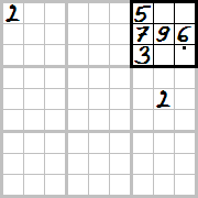 Sudoku